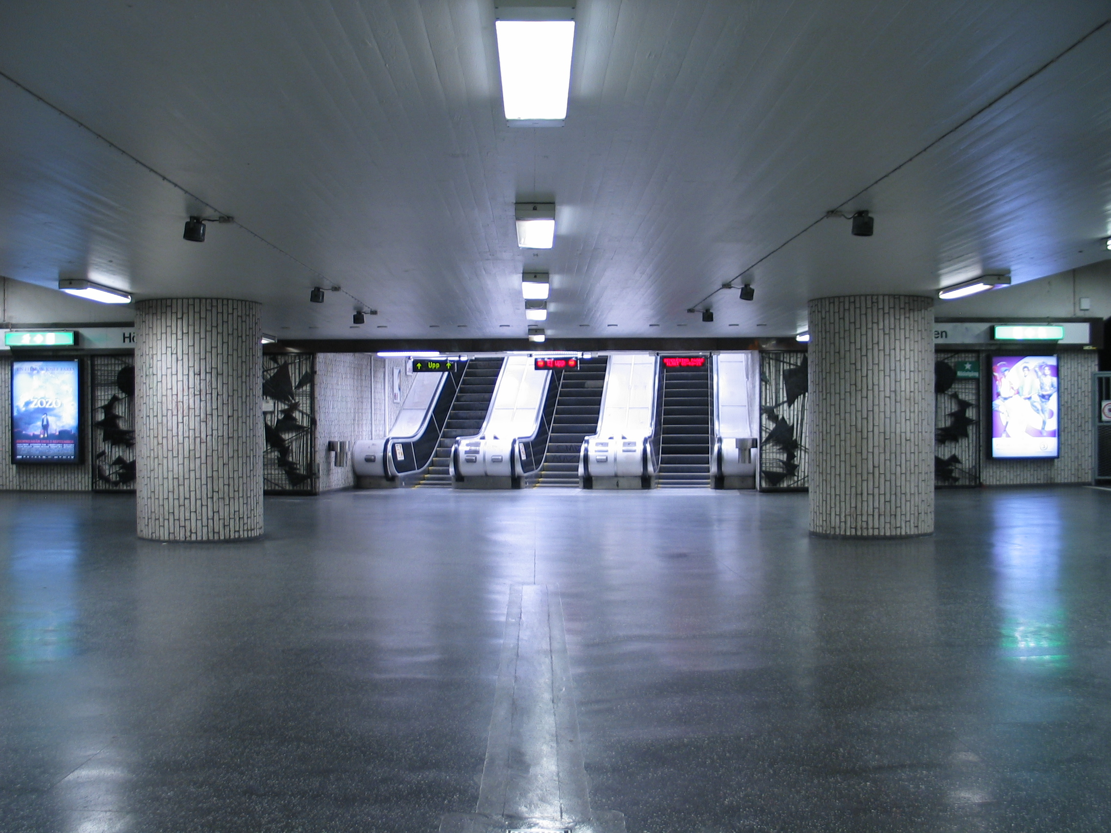 Hornstull, a metro station in Stockholm, Sweden.